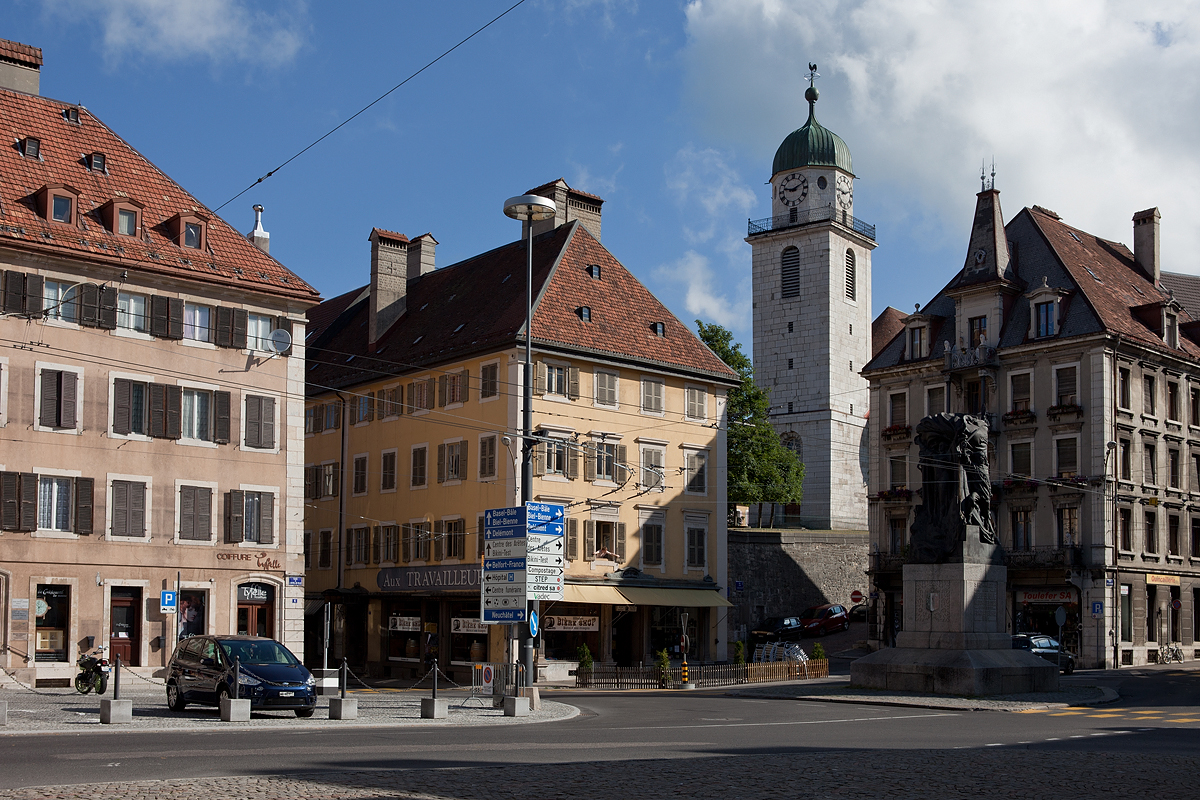 Place de l'Hôtel de Ville in La Chaux-de-Fonds mit Grand Temple